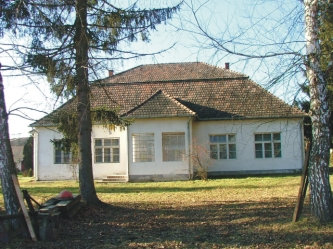 Szentpéterfölde, művelődési ház, saját kép